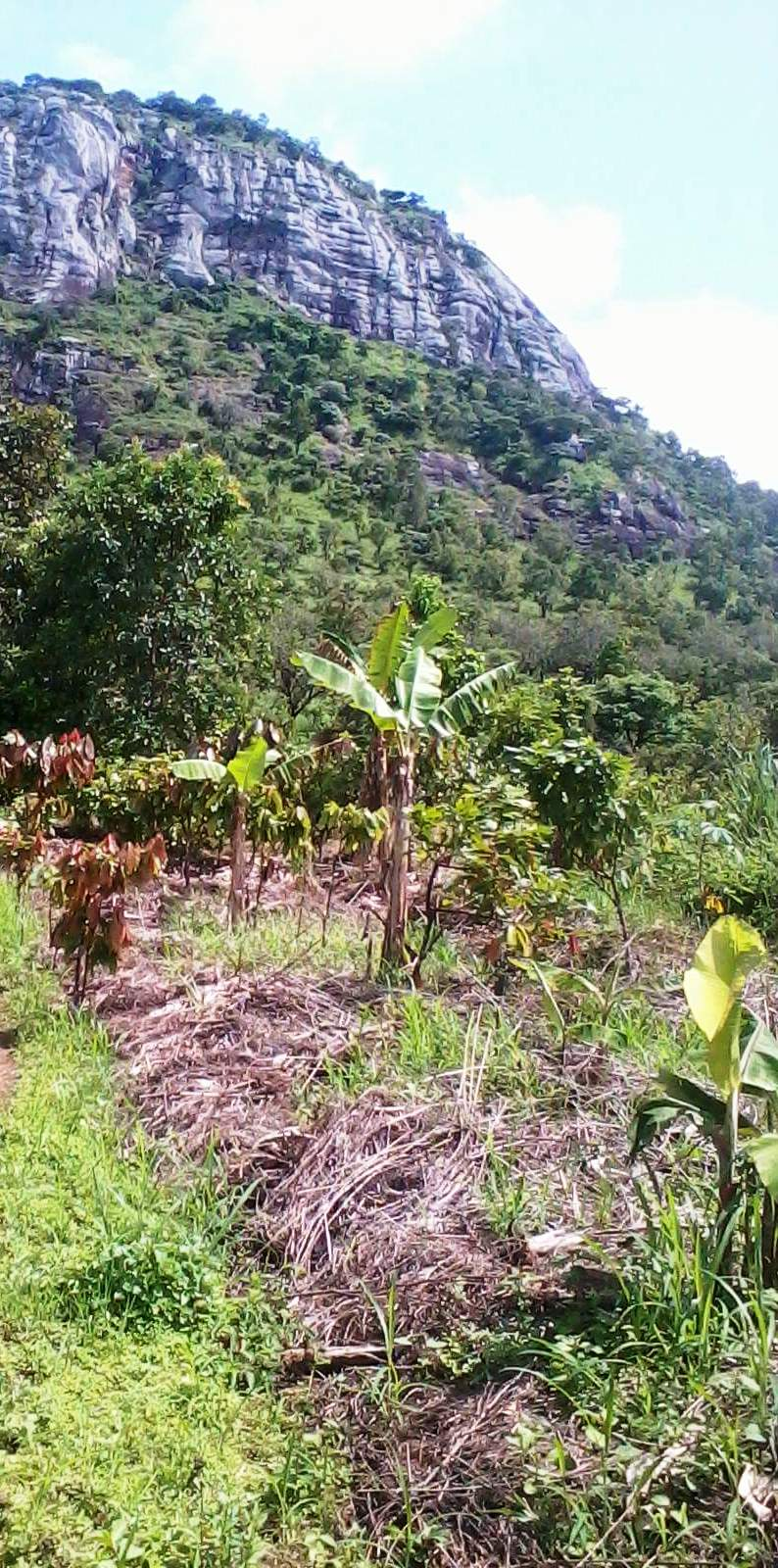 photo yangben